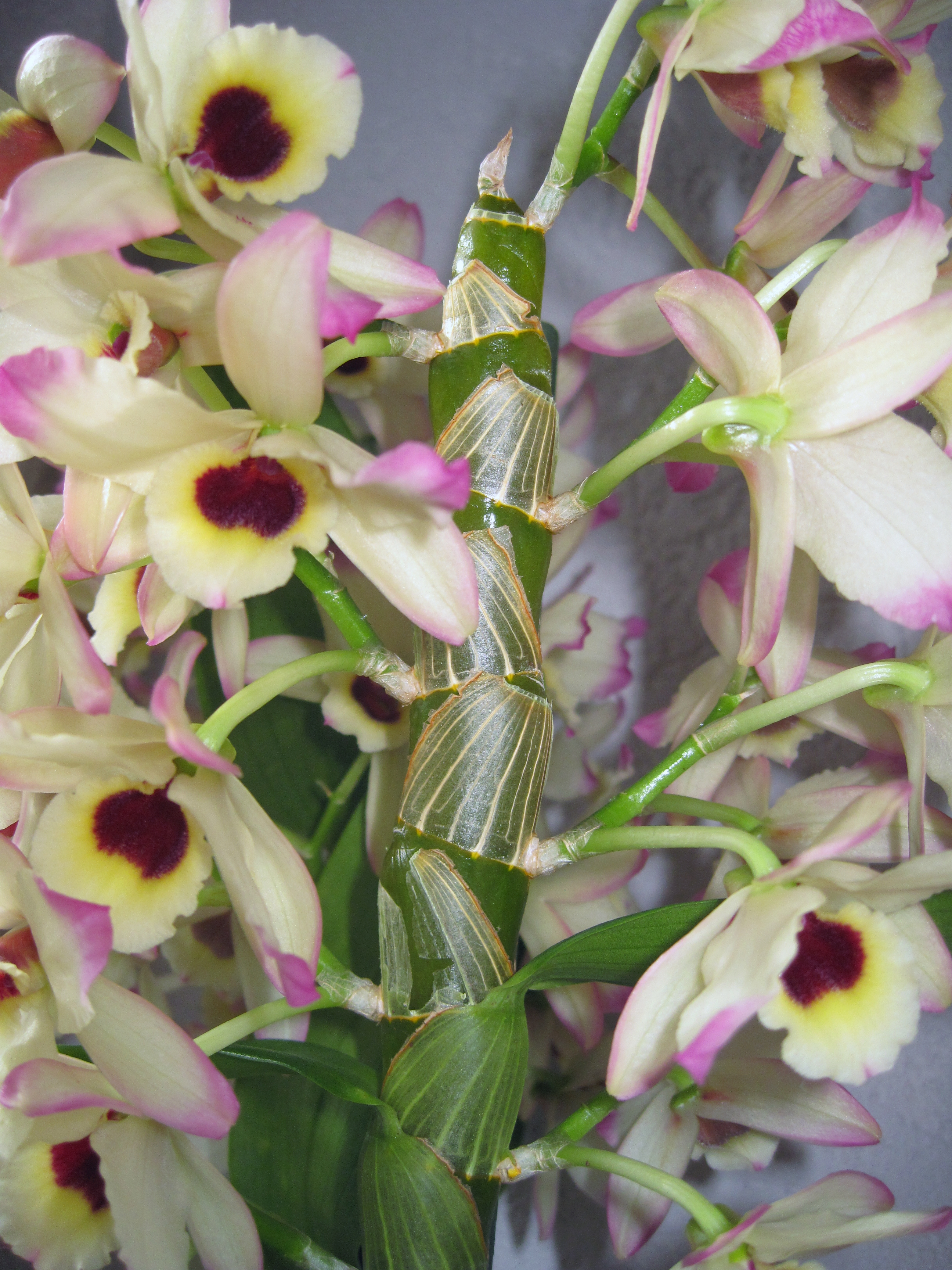 Blütenansätze an den Kanten der Sprossachse einer Dendrobium nobile, unterhalb der homoblasten Pseudobulben.